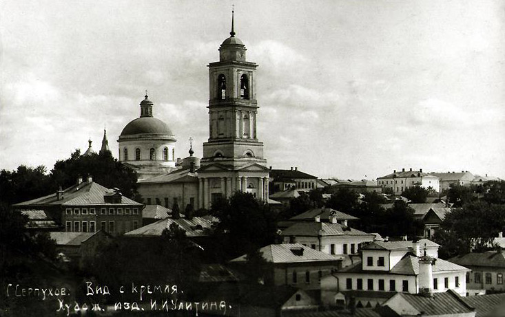 Источник: Фото сделано до 1929 года.